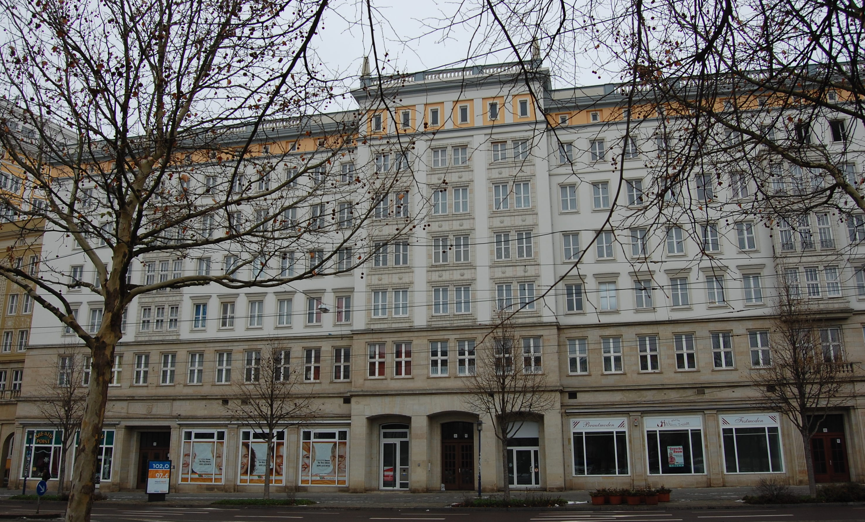 Ernst-Reuter-Allee Nr. 24 in Magdeburg, Haus des Kindersturzes 1969